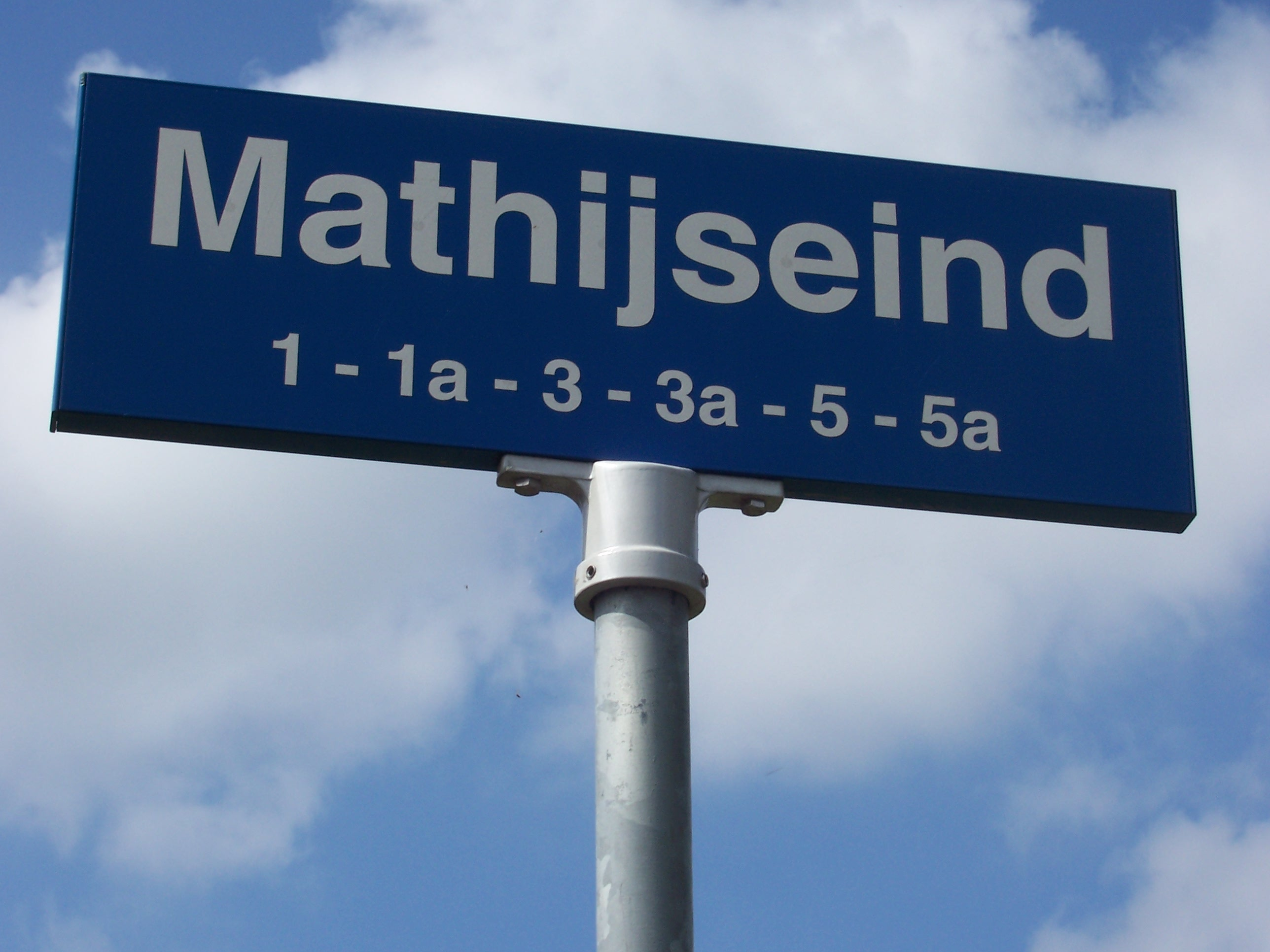 Kruispunt met zijwegen Mathijseind Bakel